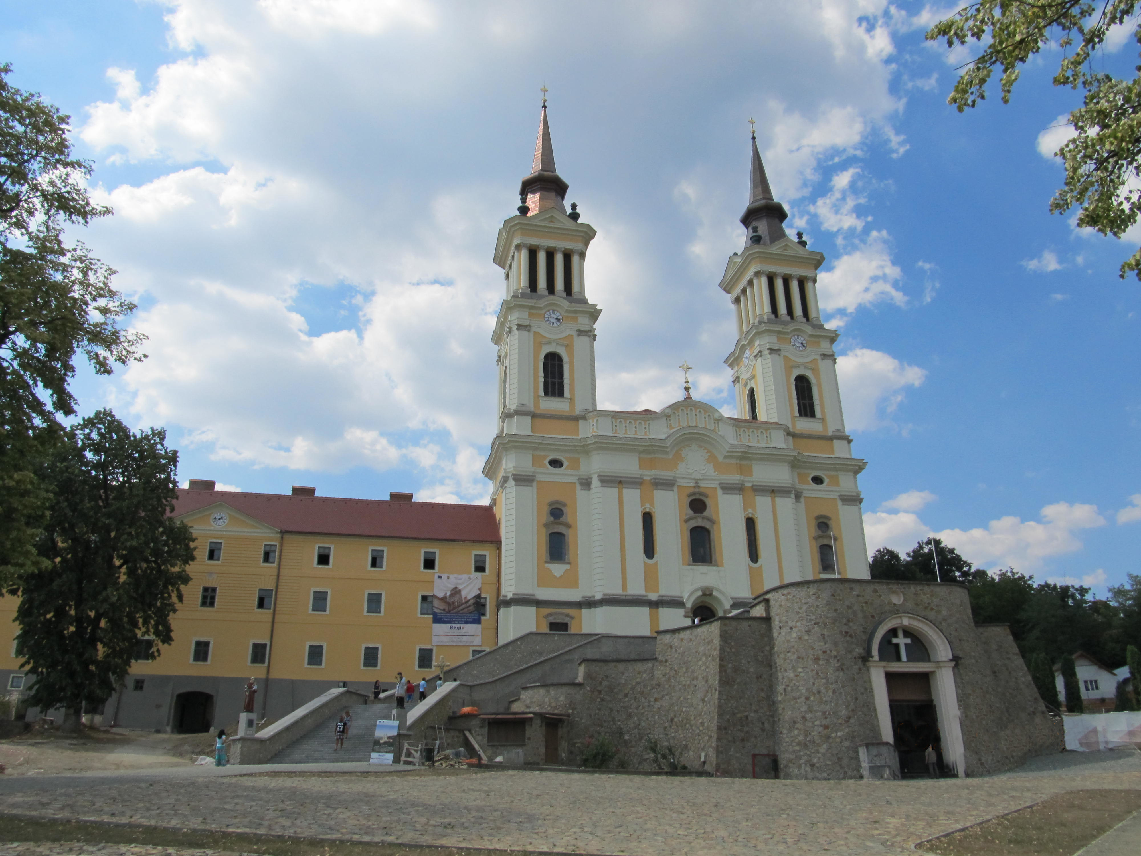 Wallfahrtsbasilika Maria Radna in Lipova, Rumänien